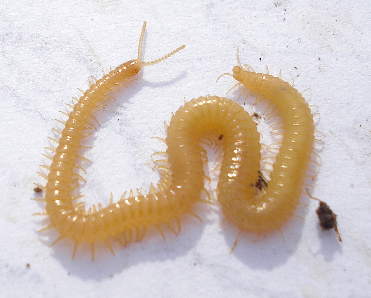 DSC09820 Chilipoda